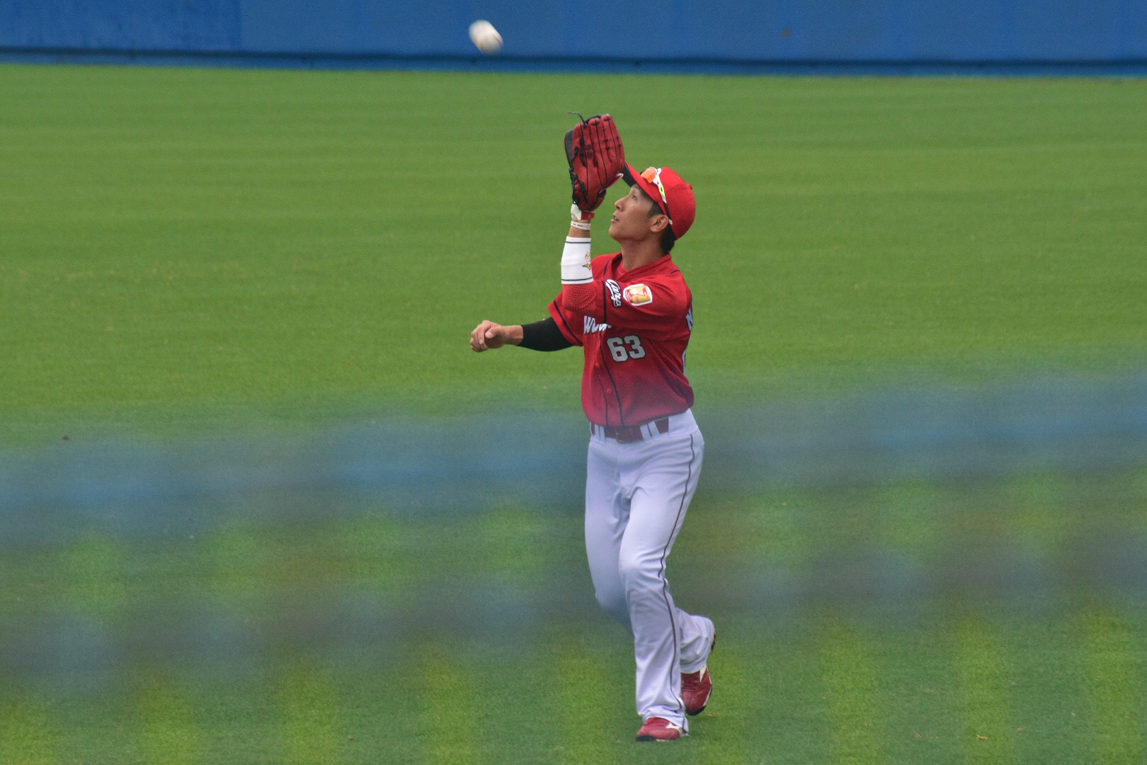 宜野湾市営球場にて、2019年2月24日撮影。